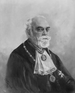 Bild in der Tübinger Professorengalerie